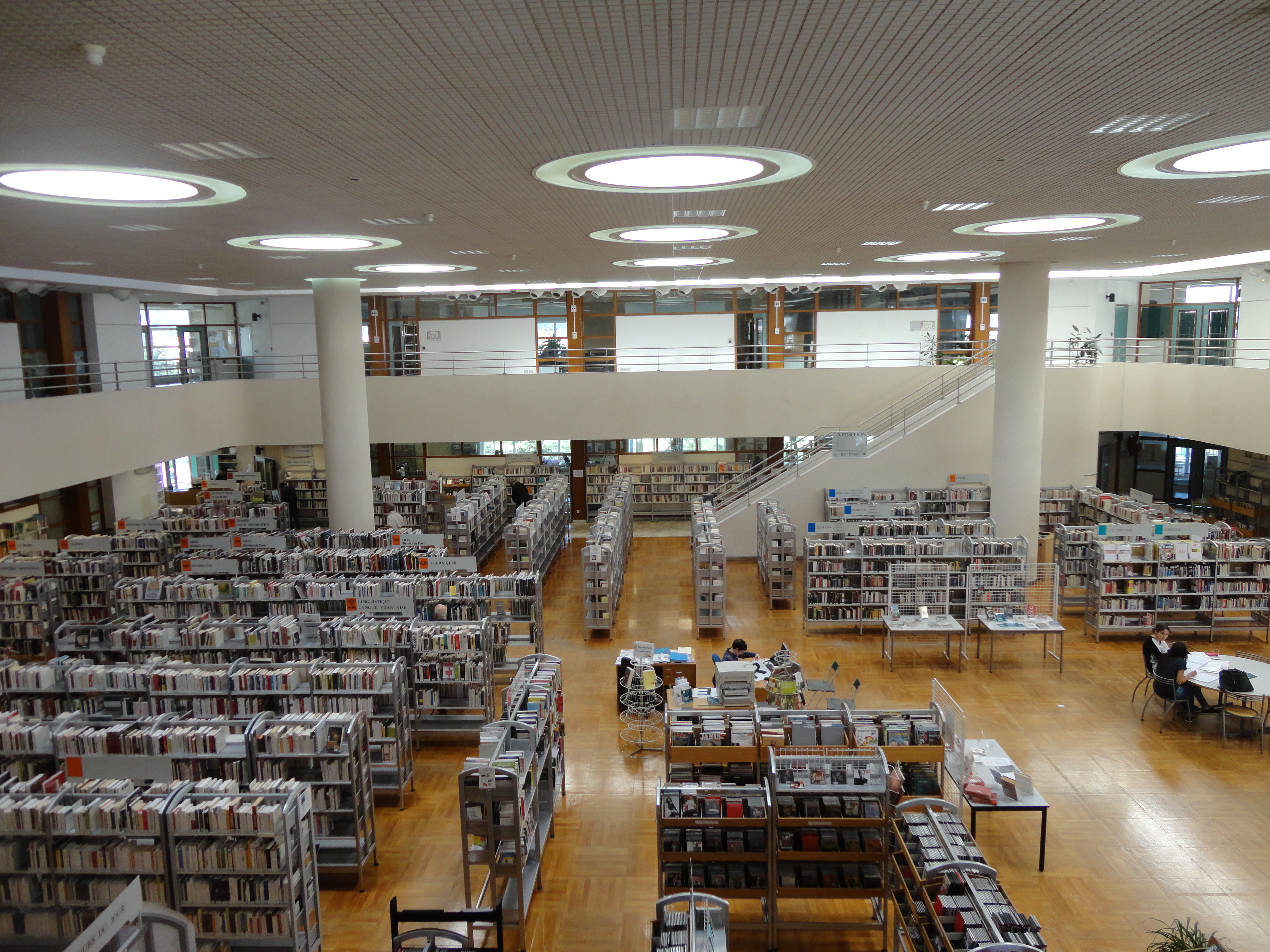 Intérieur de la médiathèque de Saint-Étienne.